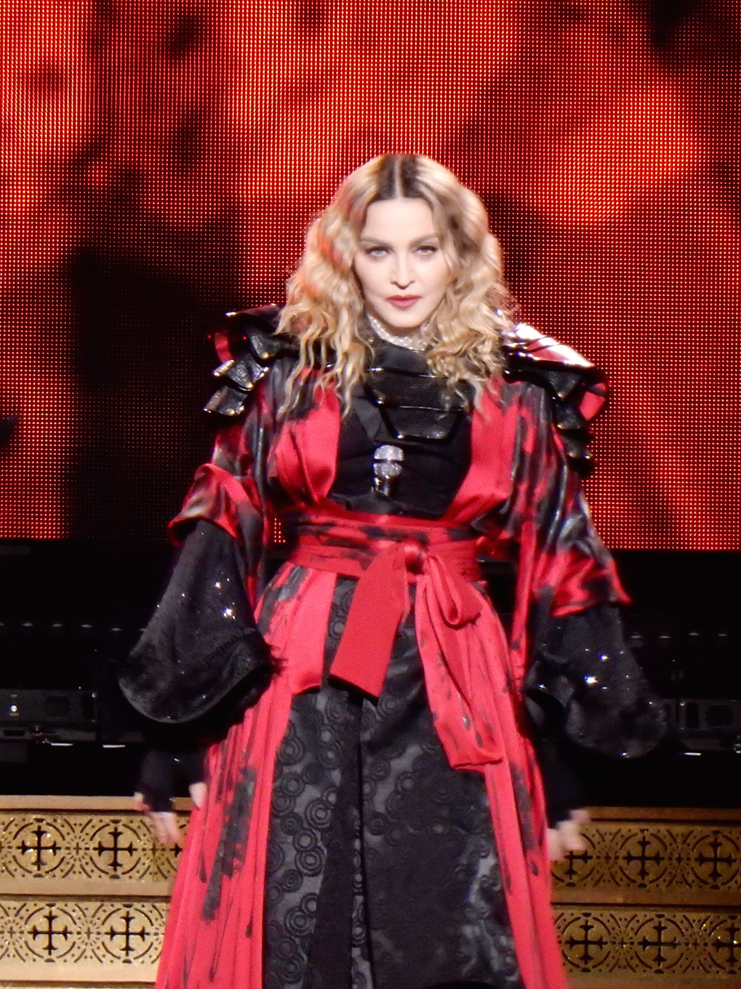 Madonna Rebel Heart Tour 2015 - Amsterdam 2